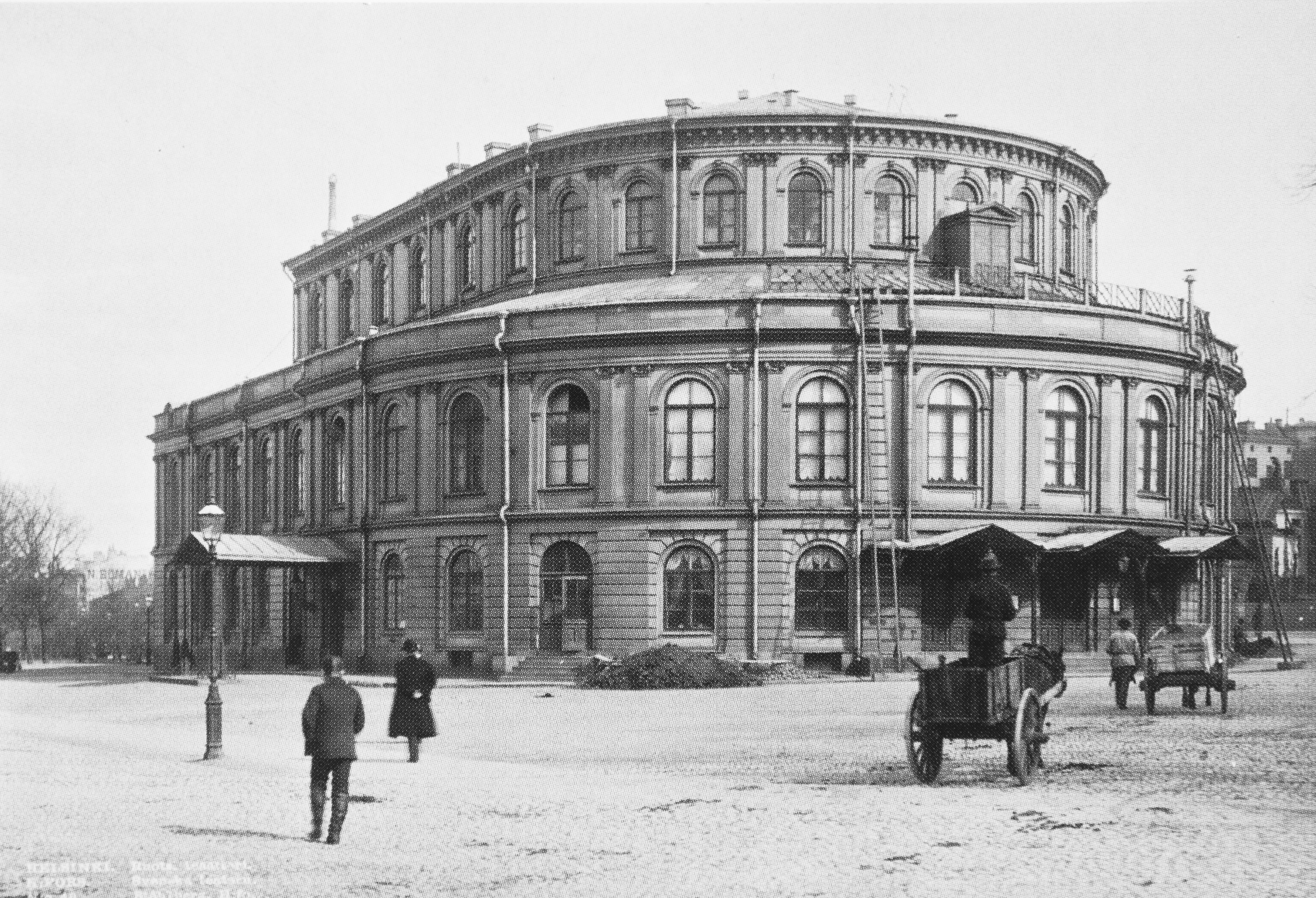 Ruotsalainen teatteri vuonna 1906.